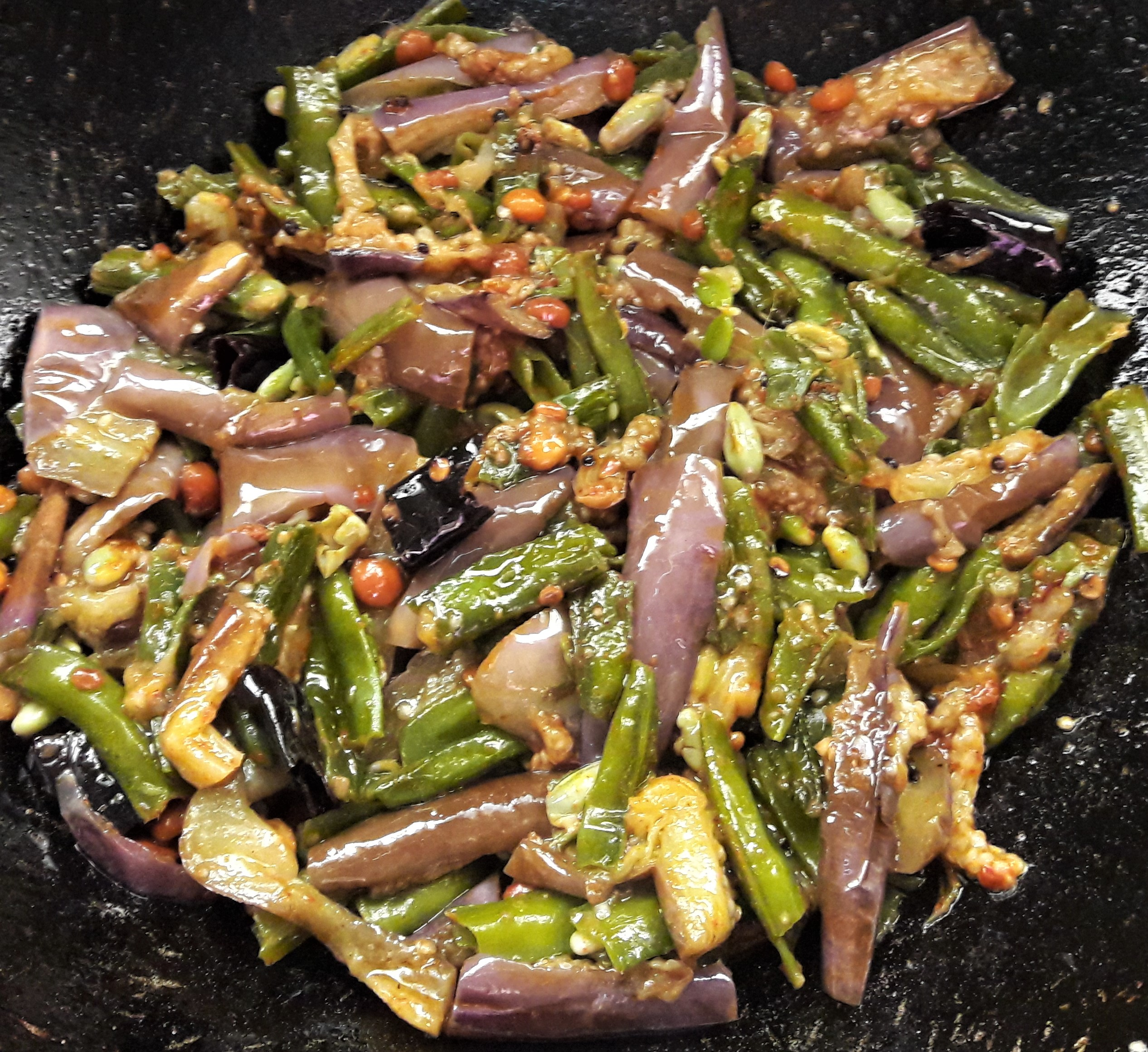 చిక్కుడుకాయ, వంకాయ ముక్కలు పోపు కూర